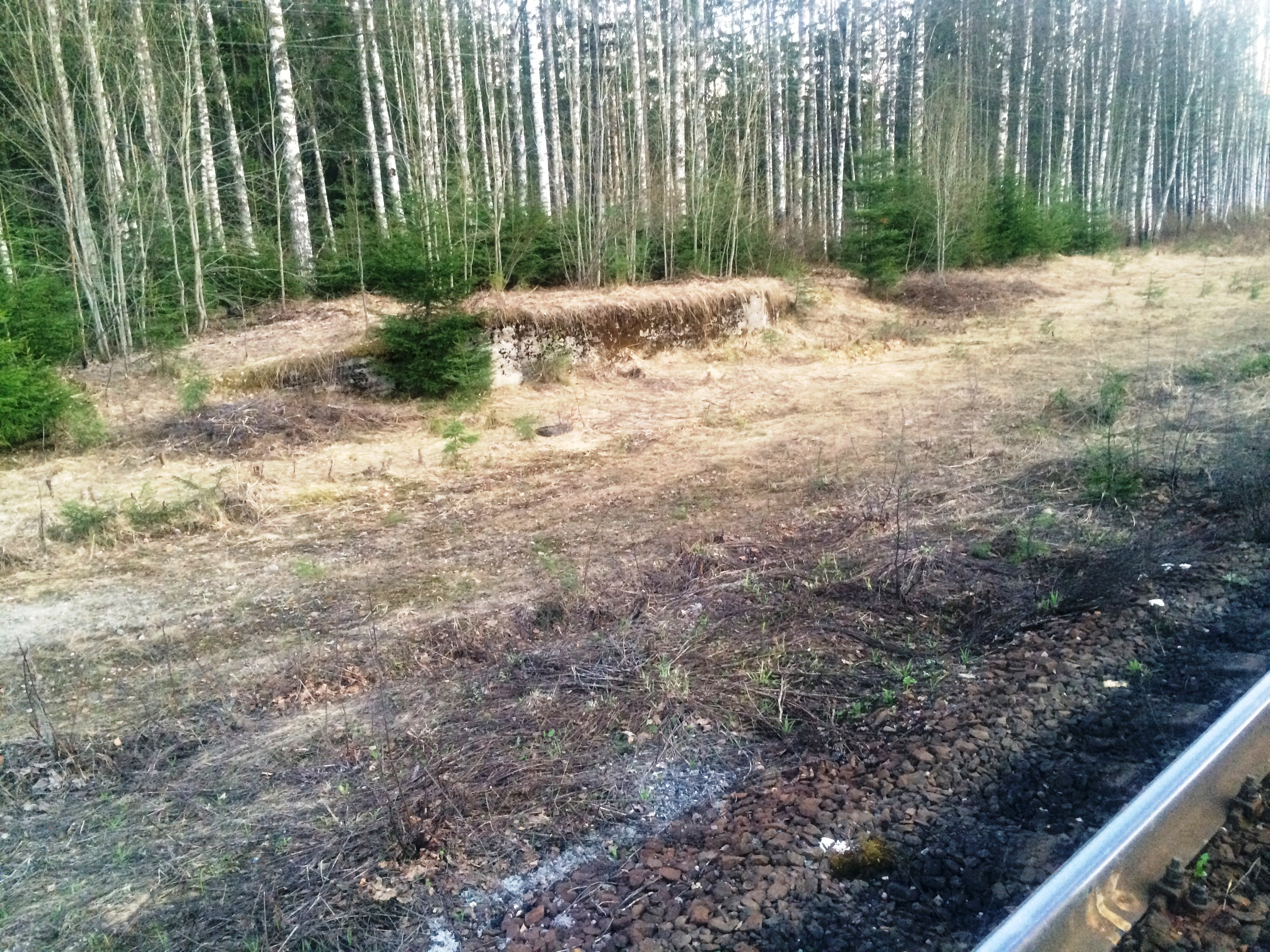 ост. п. Аккахарью